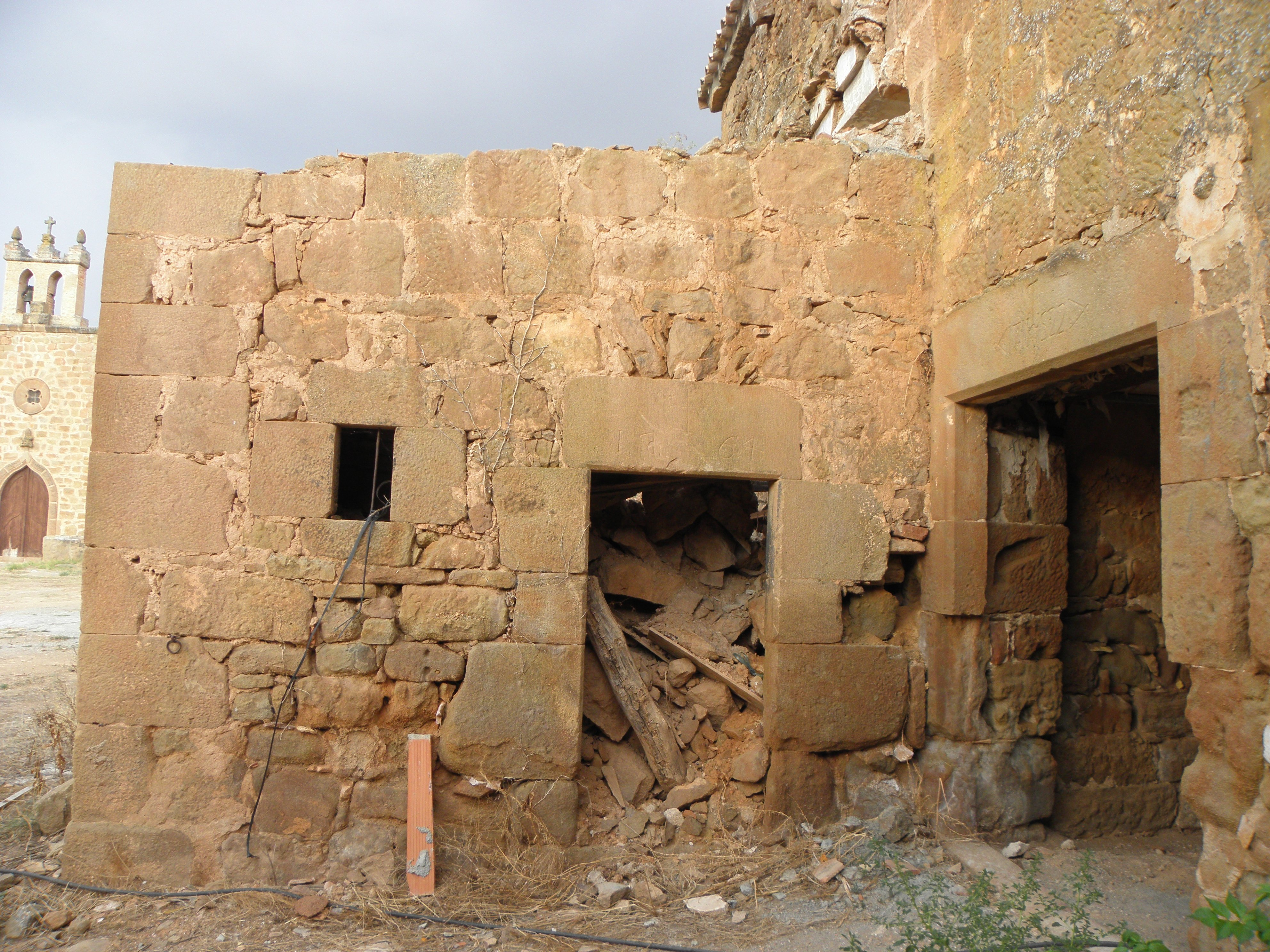 La masia de Cal Batlle, al poble de Sallent (Pinell de Solsonès). L'edigicació adosada amb la llinda datada el 1764.